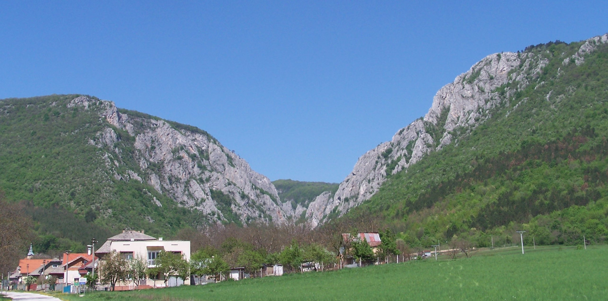 Zadielska dolina